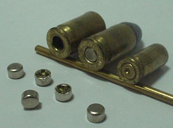 Descrição: Espoletas. À frente 5 espoletas fora dos estojos. Ao fundo 3 estojos: sem espoleta, com espoleta e com espoleta utilizada. Fonte/Créditos: Eduardo Xavier Licença